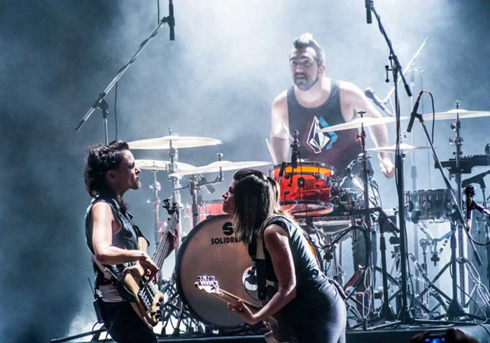 El festival muestra lo mejor de lo nuevo en música, cine, danza callejera, arte, moda, stand up, arte urbano y deportes, entre otras expresiones de la cultura joven. Del 21 al 23 de mayo se realizará la primera edición en la Plaza de la Música de la capital metropolitana.